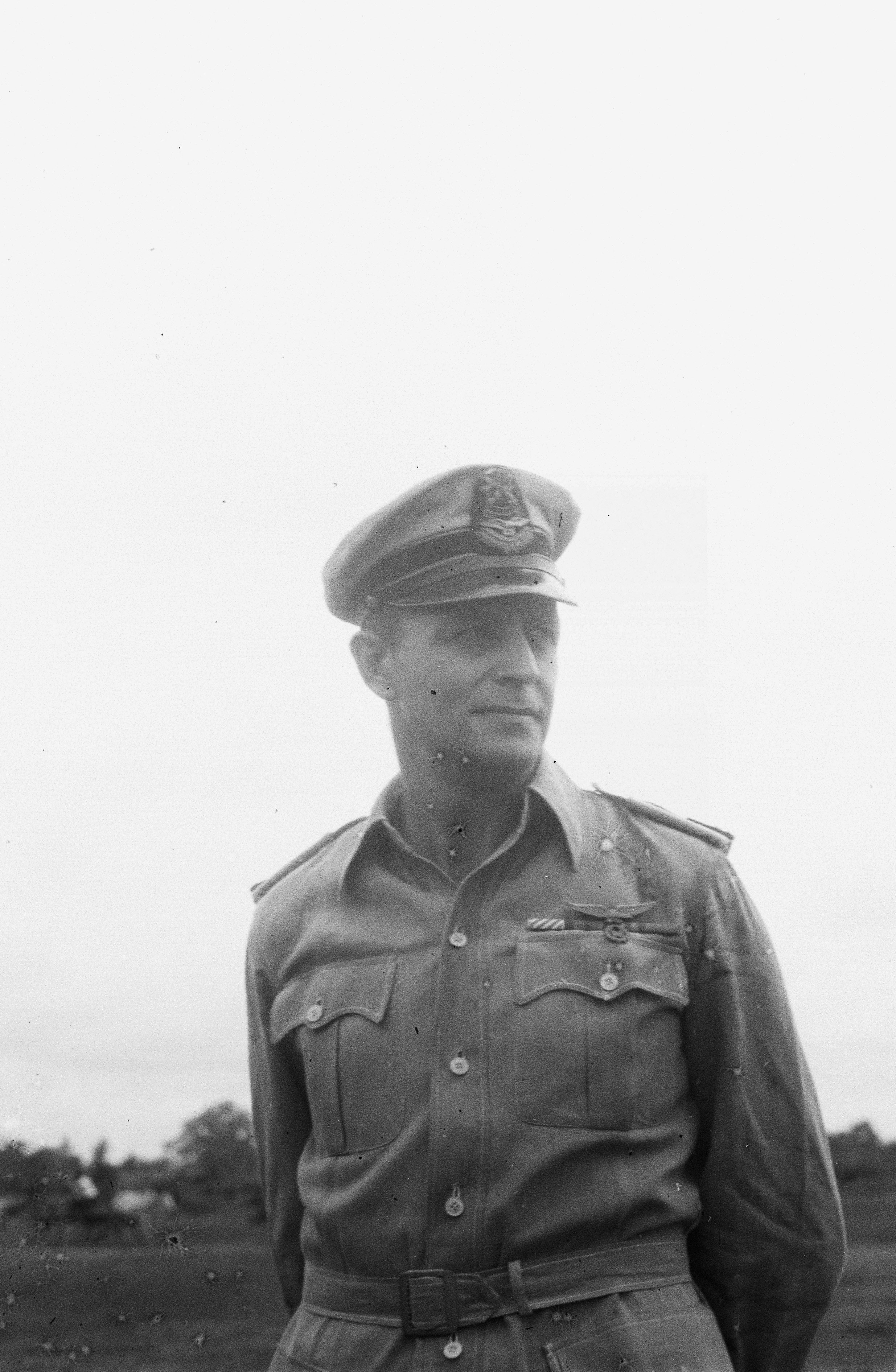 Collectie / Archief : Fotocollectie Dienst voor Legercontacten Indonesië Reportage / Serie : [DLC] Commando-overdracht Militaire Landmacht te Medan Beschrijving : Op donderdag 17 februari vond op de 11e luchtbasis te Medan de overdracht van het Regionaal Luchtvaartcommando plaats. De vertrekkende commandant majoor H. Maurenbrecher gaf het commando over aan majoor vlieger P.J.E. Janssens. Majoor H. Maurenbrecher Datum : 17 februari 1949 Locatie : Indonesië, Nederlands-Indië Persoonsnaam : Maurenbrecher, H. Fotograaf : Fotograaf Onbekend / DLC Auteursrechthebbende : Nationaal Archief Materiaalsoort : Negatief (zwart/wit) Nummer archiefinventaris : bekijk toegang 2.24.04.02 Bestanddeelnummer : 3390